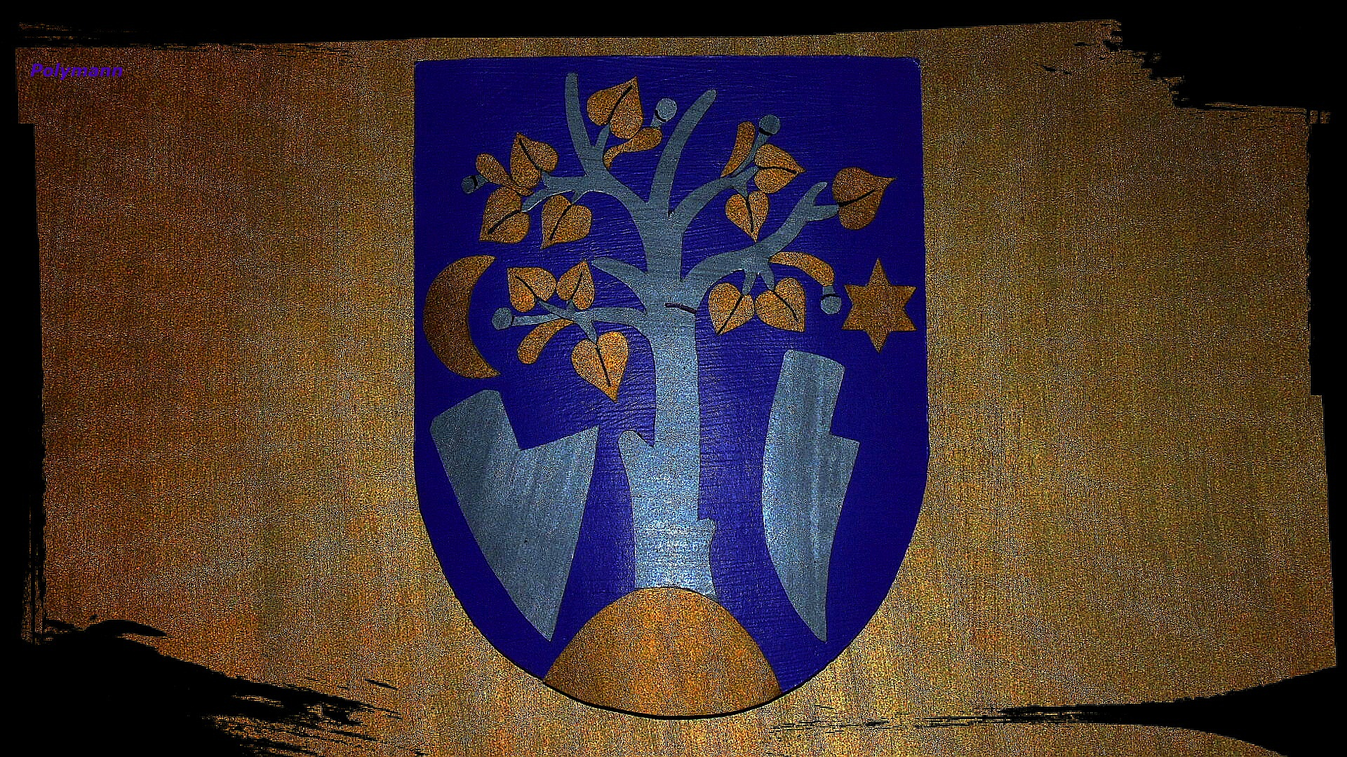 videl som na nasej stranke erb nasej obce a napadla ma myslienka a zvedavost ako vyzera realnejsie. tak som sa do toho pustil